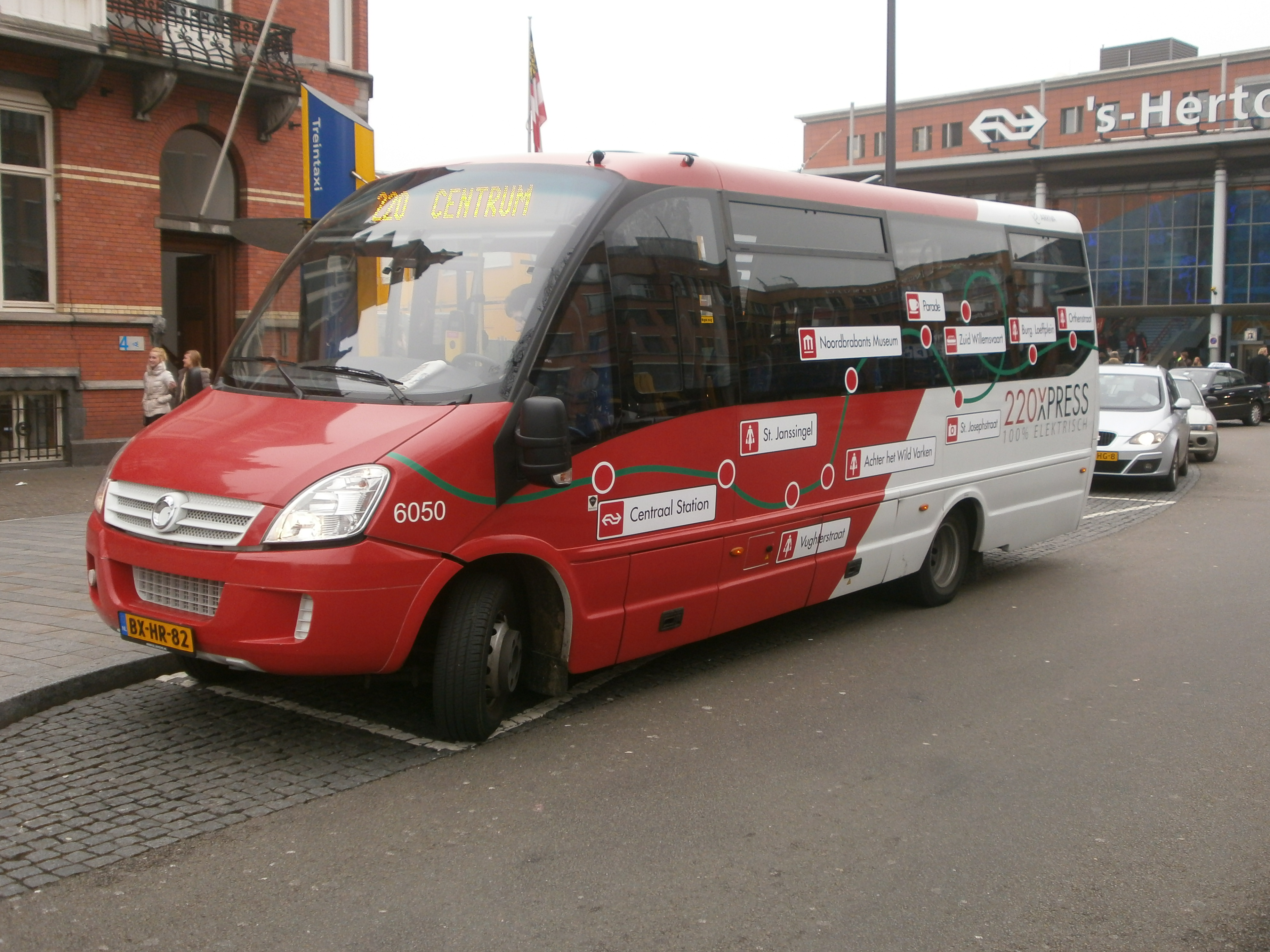 Elektrische bus die dienst doet op de 220Xpress in 's-Hertogenbosch, volgens de nieuwe huisstijl.